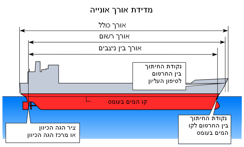 schematic drawing of ship's size